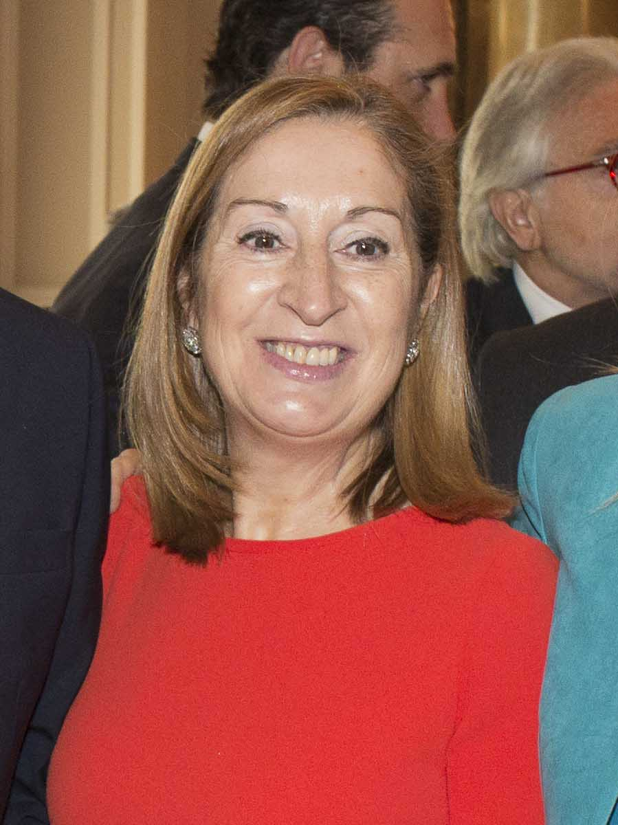 Desayuno Informativo Nueva Economía Forum